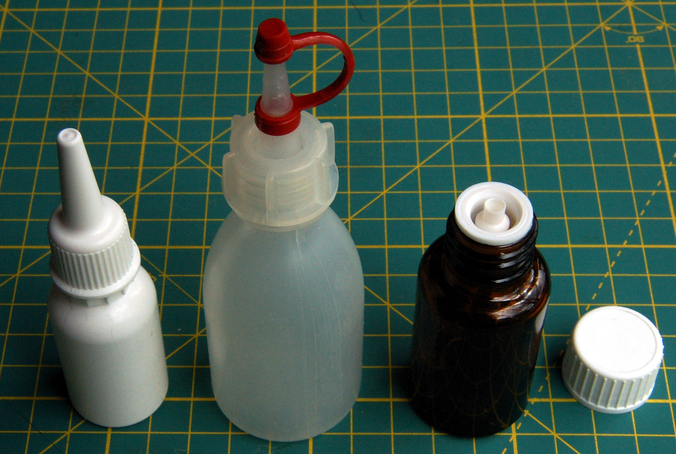 Abbildung von Tropfflaschen aus Kunststoff und Glas